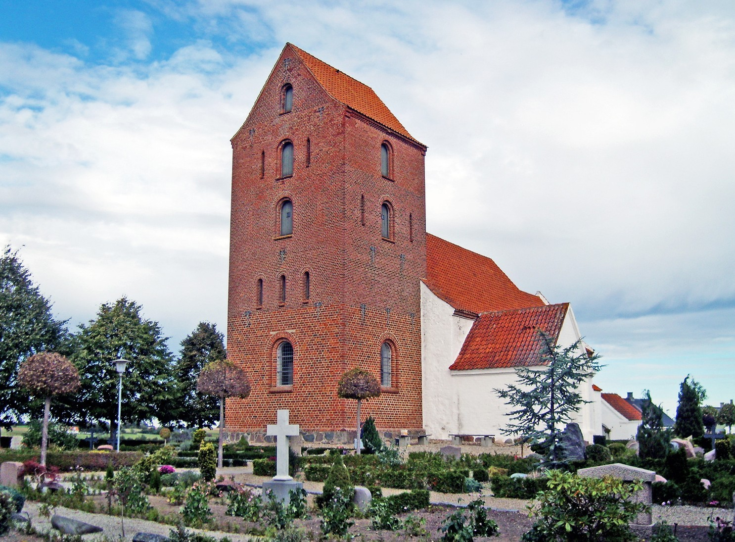 fra sydvest